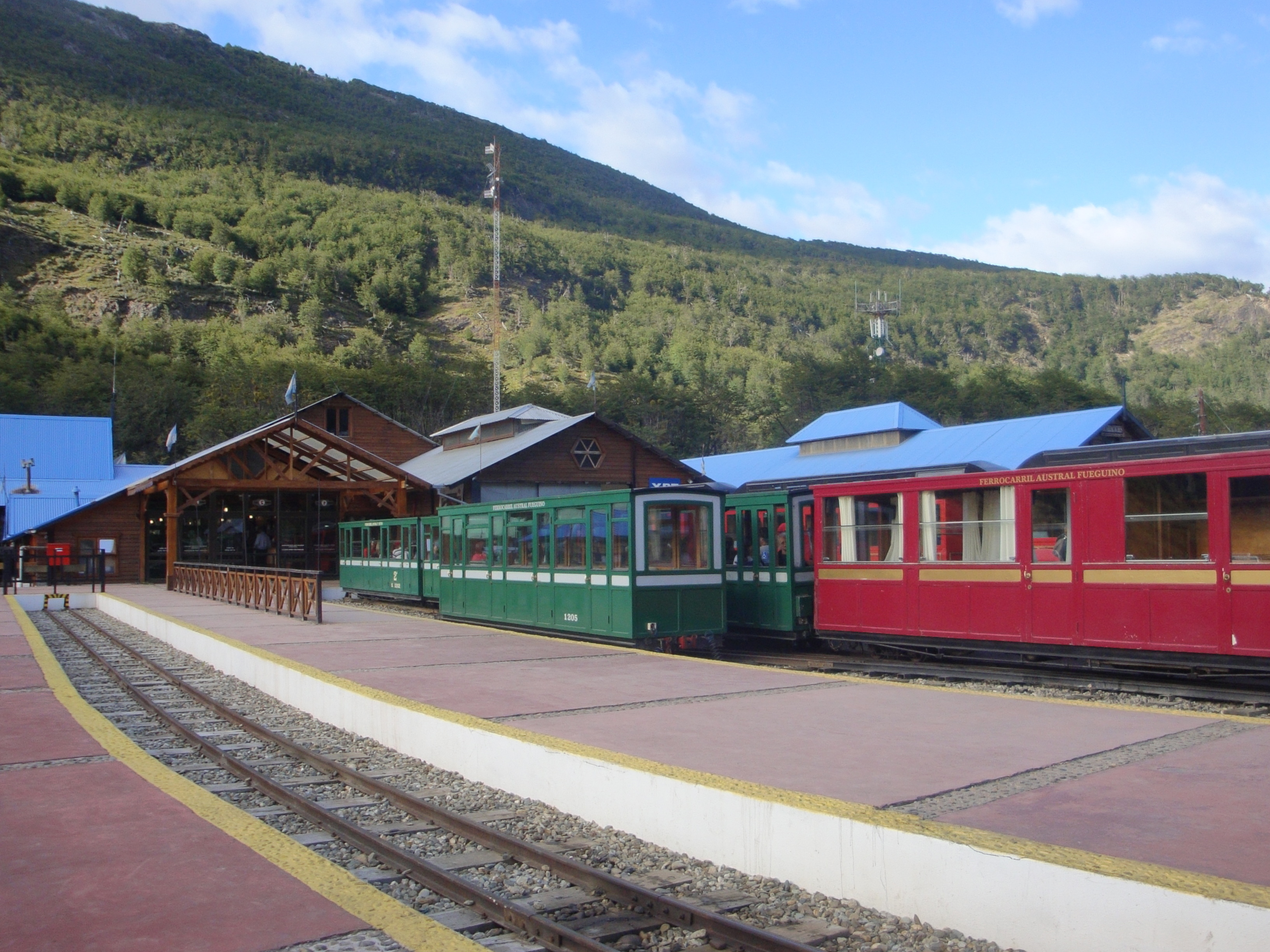 Estación Fin del Mundo, Tren del Fin del Mundo, Ushuaia, Argentina.